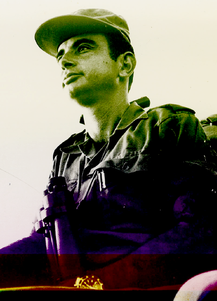 סא"ל גדעון רז מפקד פלגה 33 1973